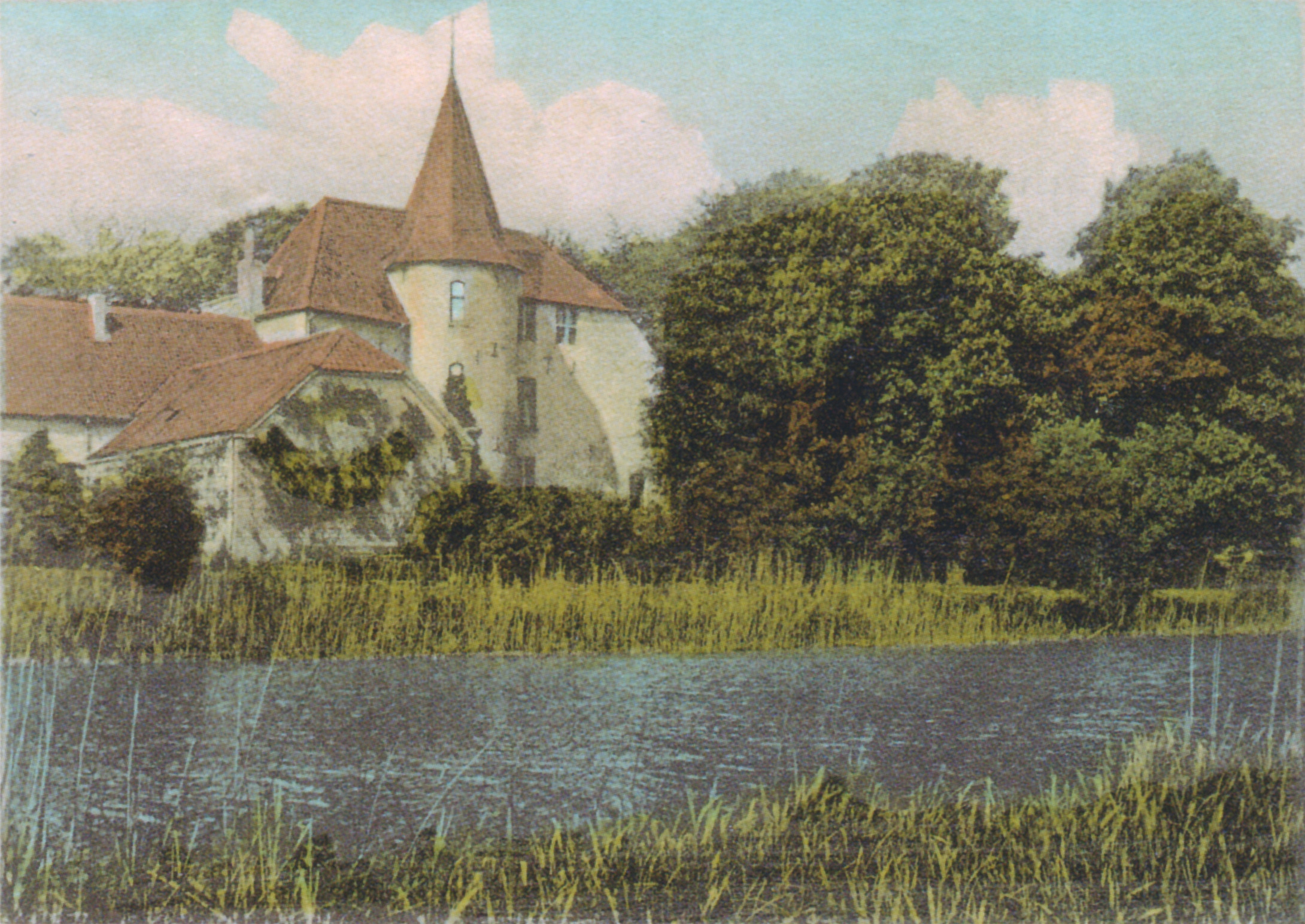 Haus Empel in Rees-Empel als Motiv einer Postkarte von 1908